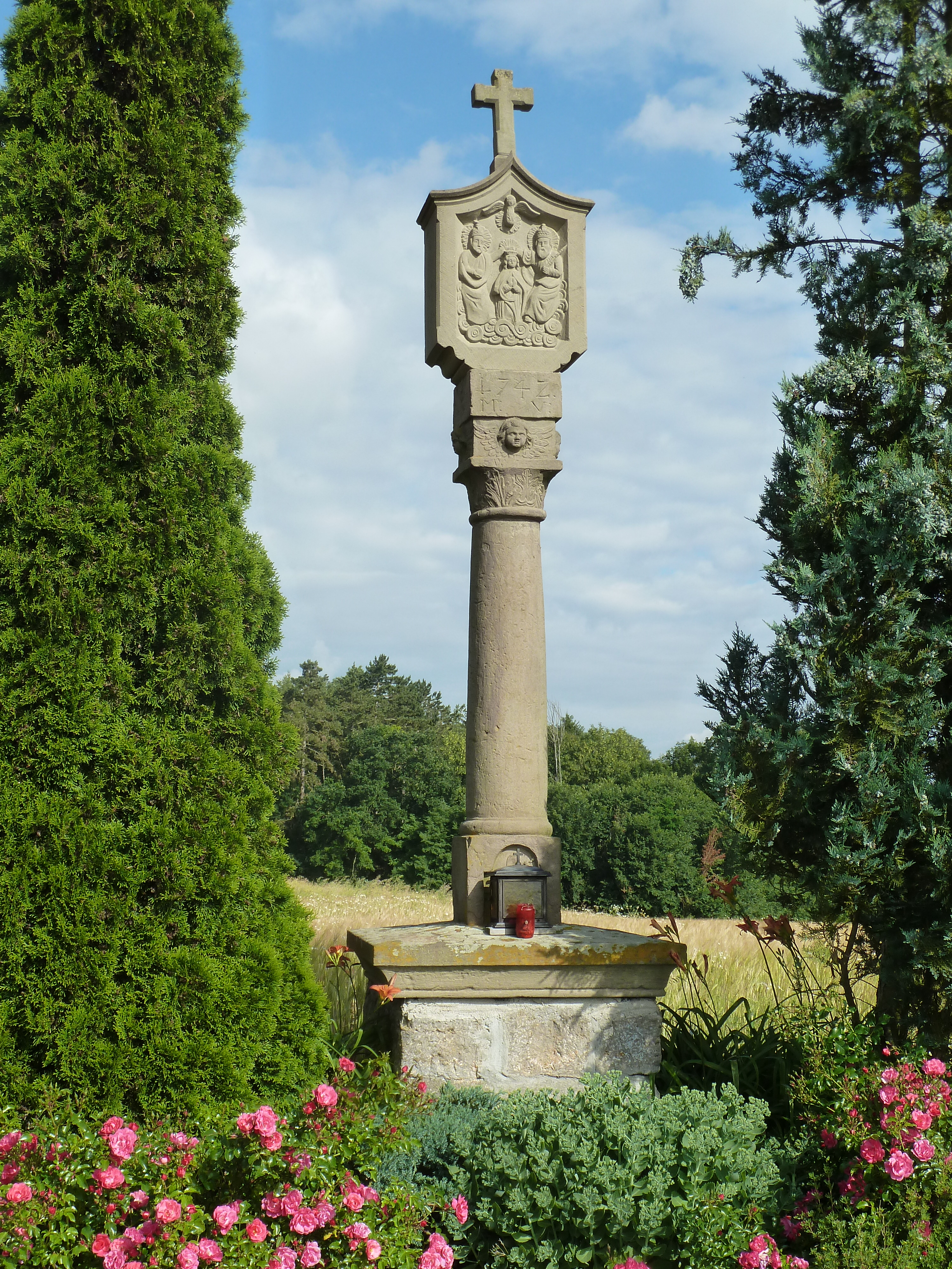 "Roter Bildstock" östlich von Rannungen, Sandstein, von 1774.